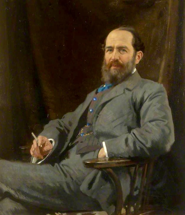 Sir Arthur Schuster (1851–1934)